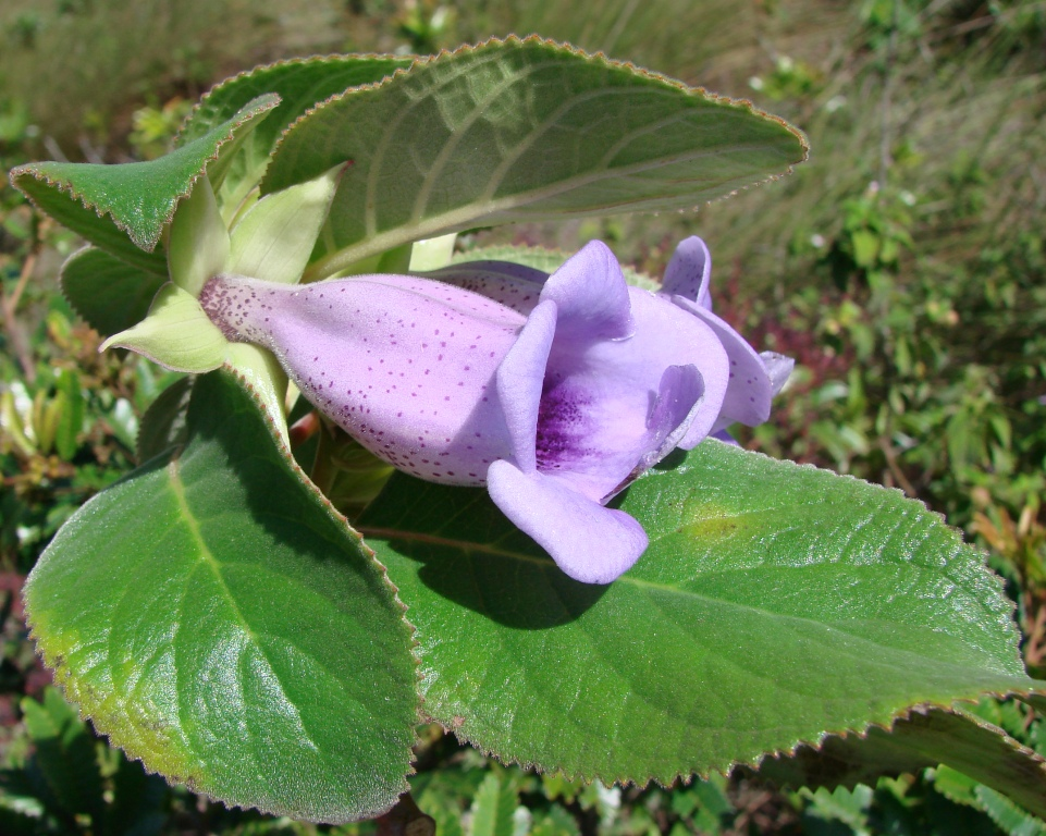 Paliavana tenuiflora - GESNERIACEAE - Parque Nacional da Chapada Diamantina - Palmeiras - Bahia - Brasil.